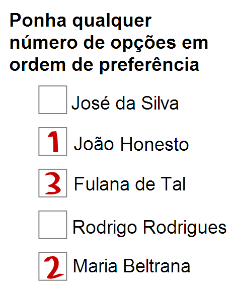 Exemplo de cÃ©dula para votaÃ§Ã£o por ordenaÃ§Ã£o. Adaptado de pt::en:Image:Preferential ballot.svg